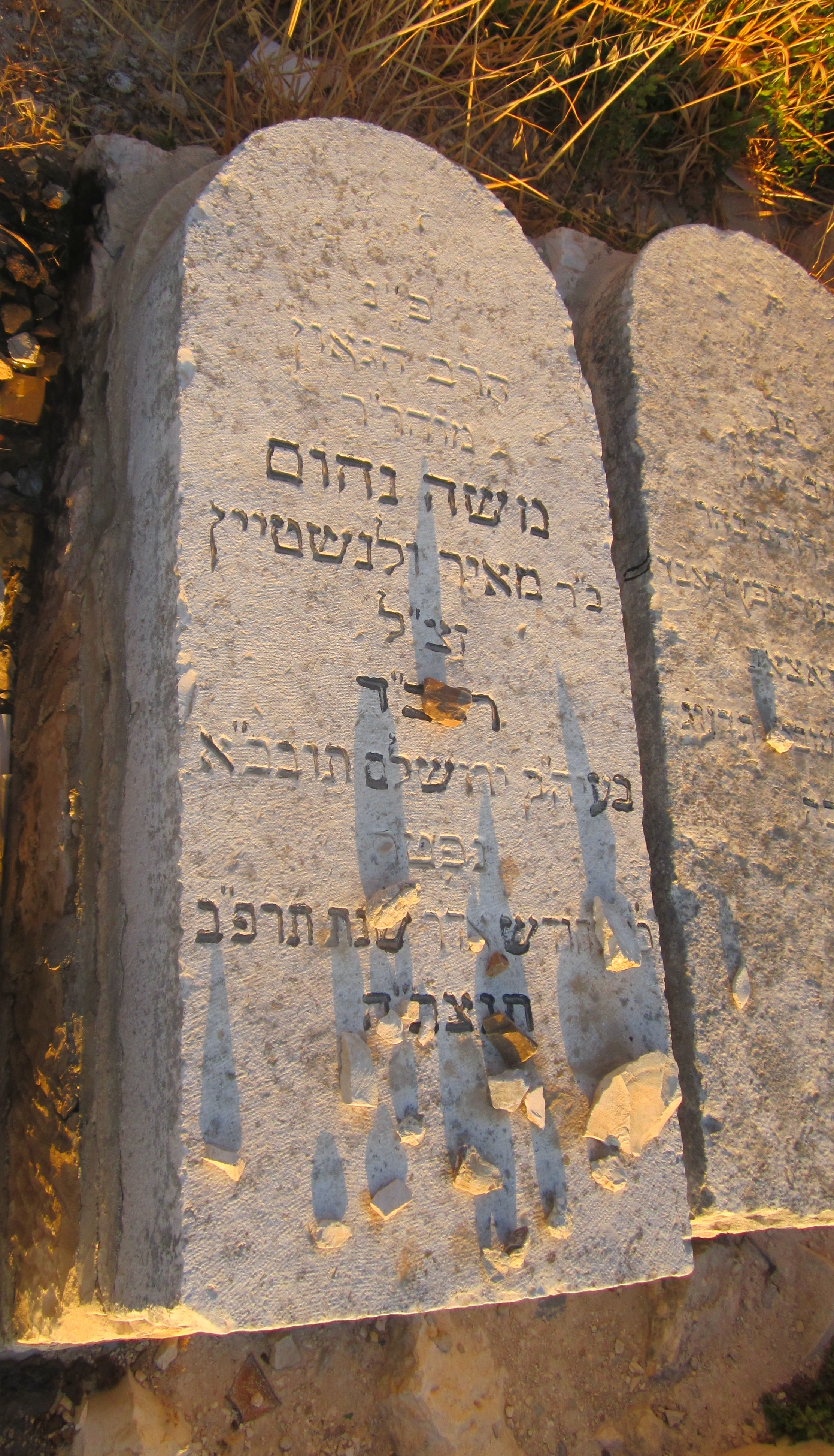 קבר הרב משה נחום ולנשטיין בהר הזיתים